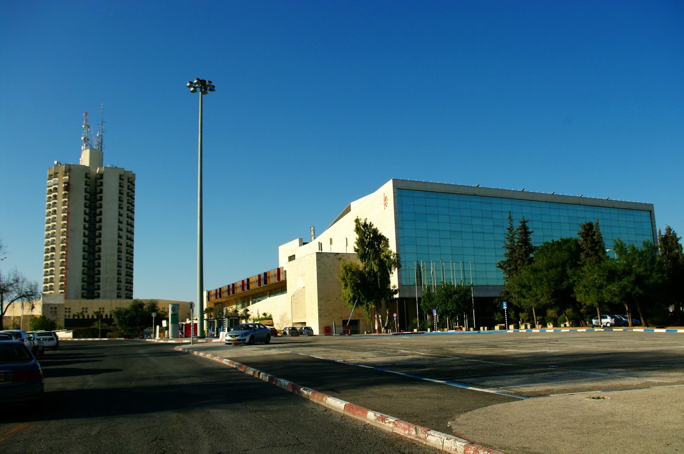 Kongresszentrum Binyanei HaUma, Westjerusalem